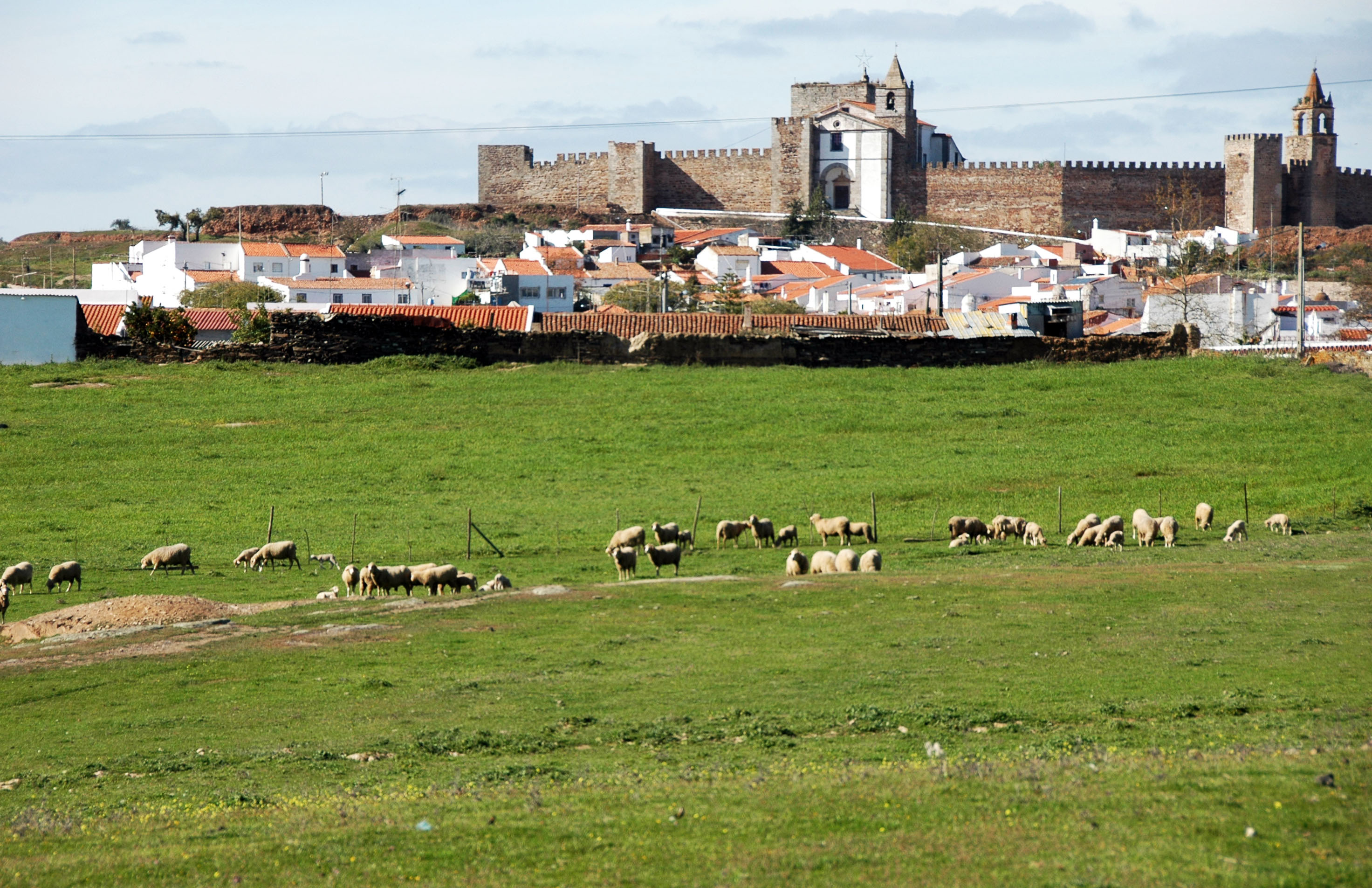 Mourão